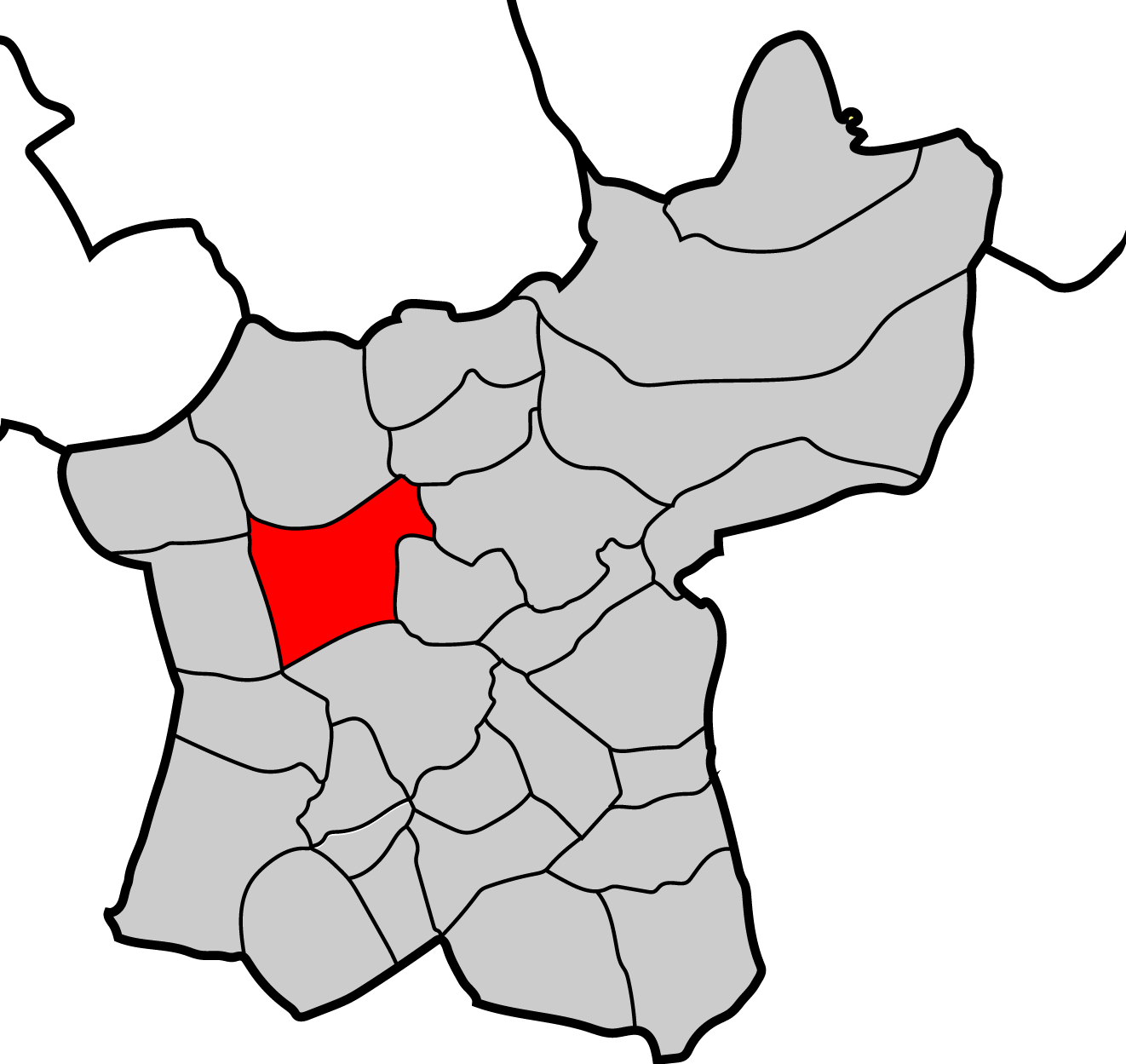 Mapa parroquia de Vilartelin Baralla